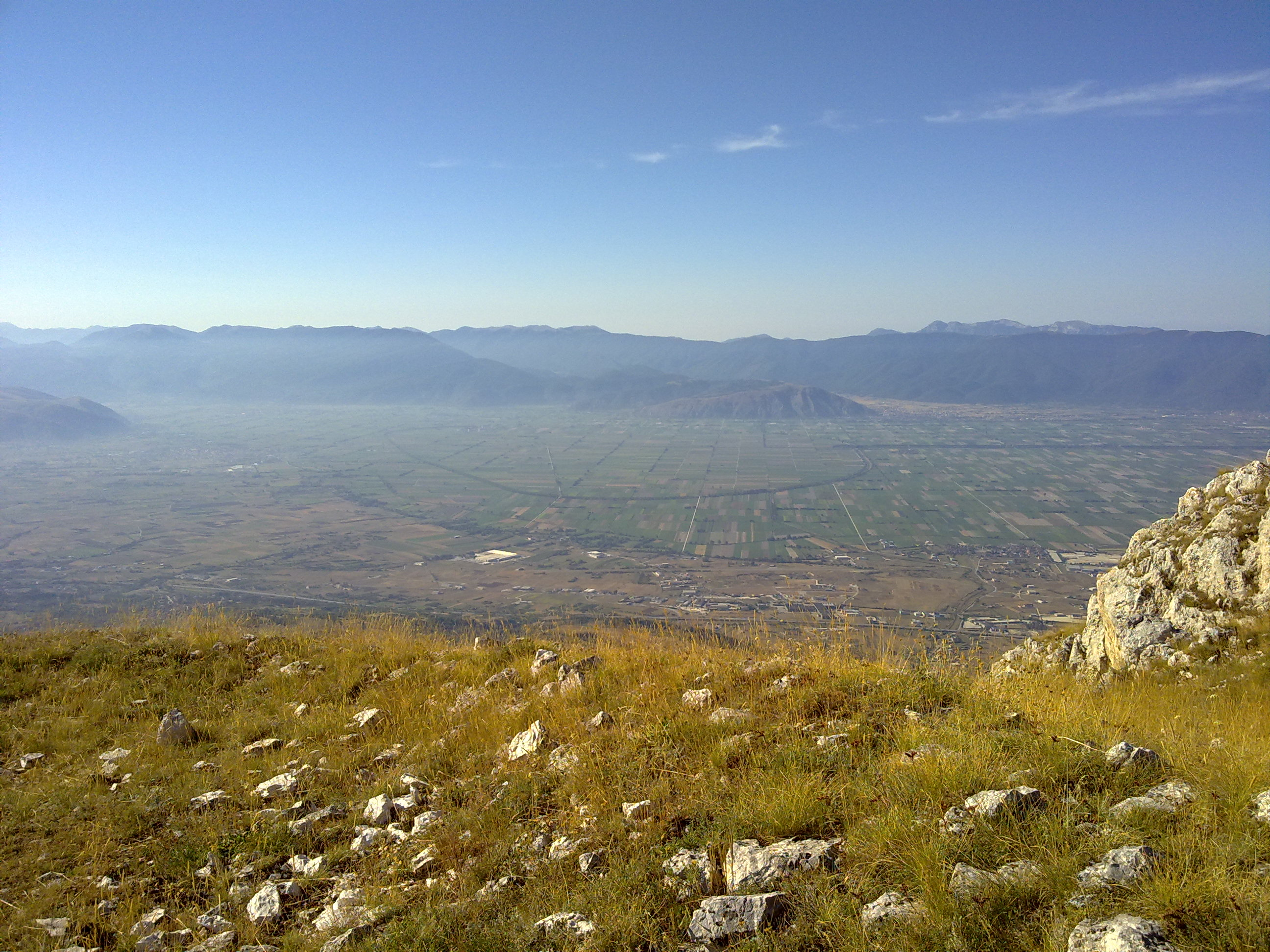 Conca del Fucino vista dalla Serra di Celano